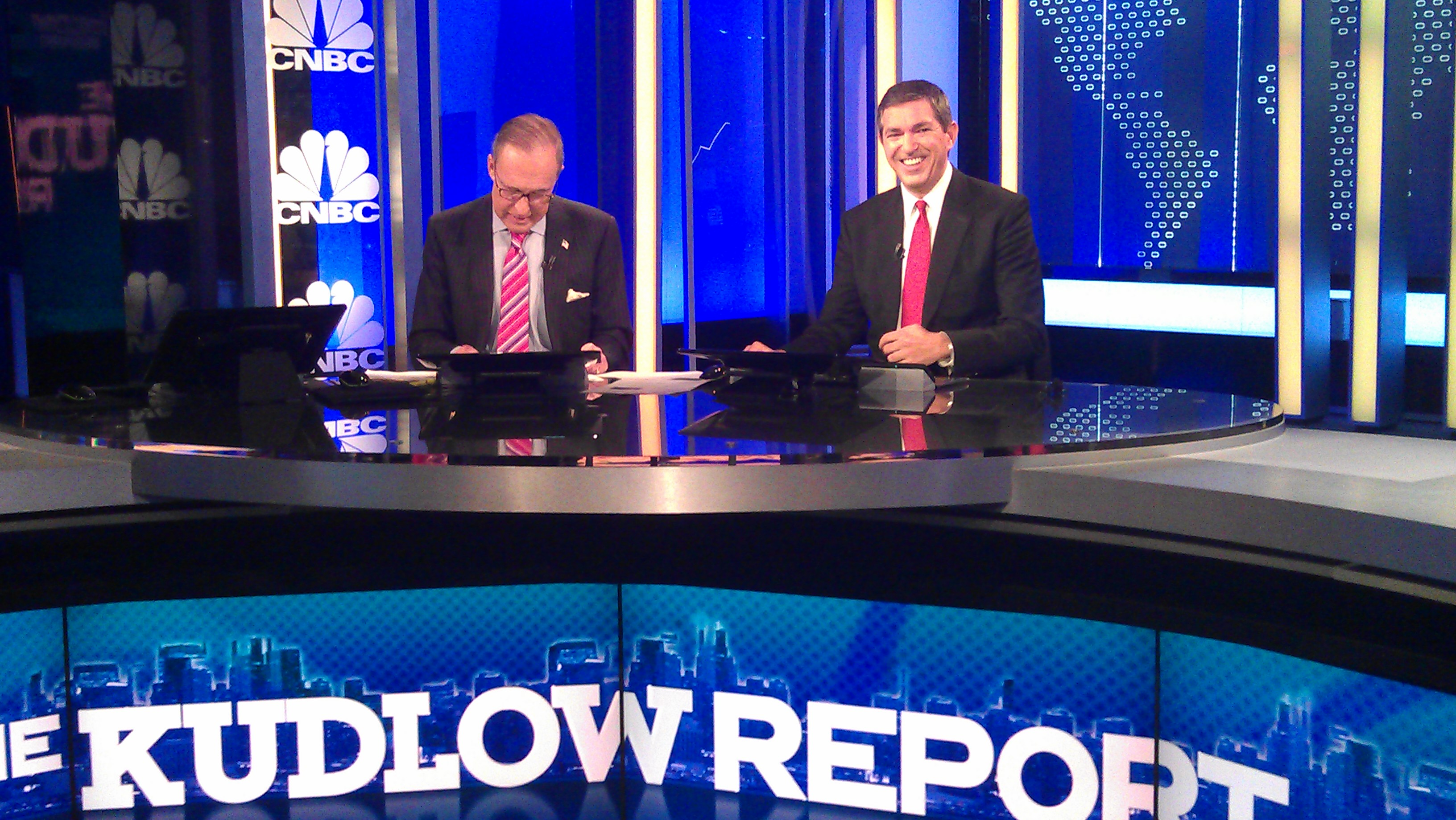 Συνέντευξη ΥΠΕΞ Σταύρου Λαμπρινίδη σε εκμπομπή "The Kudrow Report" σε τ/σ CNBC (Νέα Υόρκη, 20.09.2011)